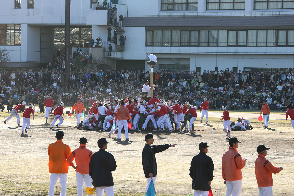 Bo-Taoshi